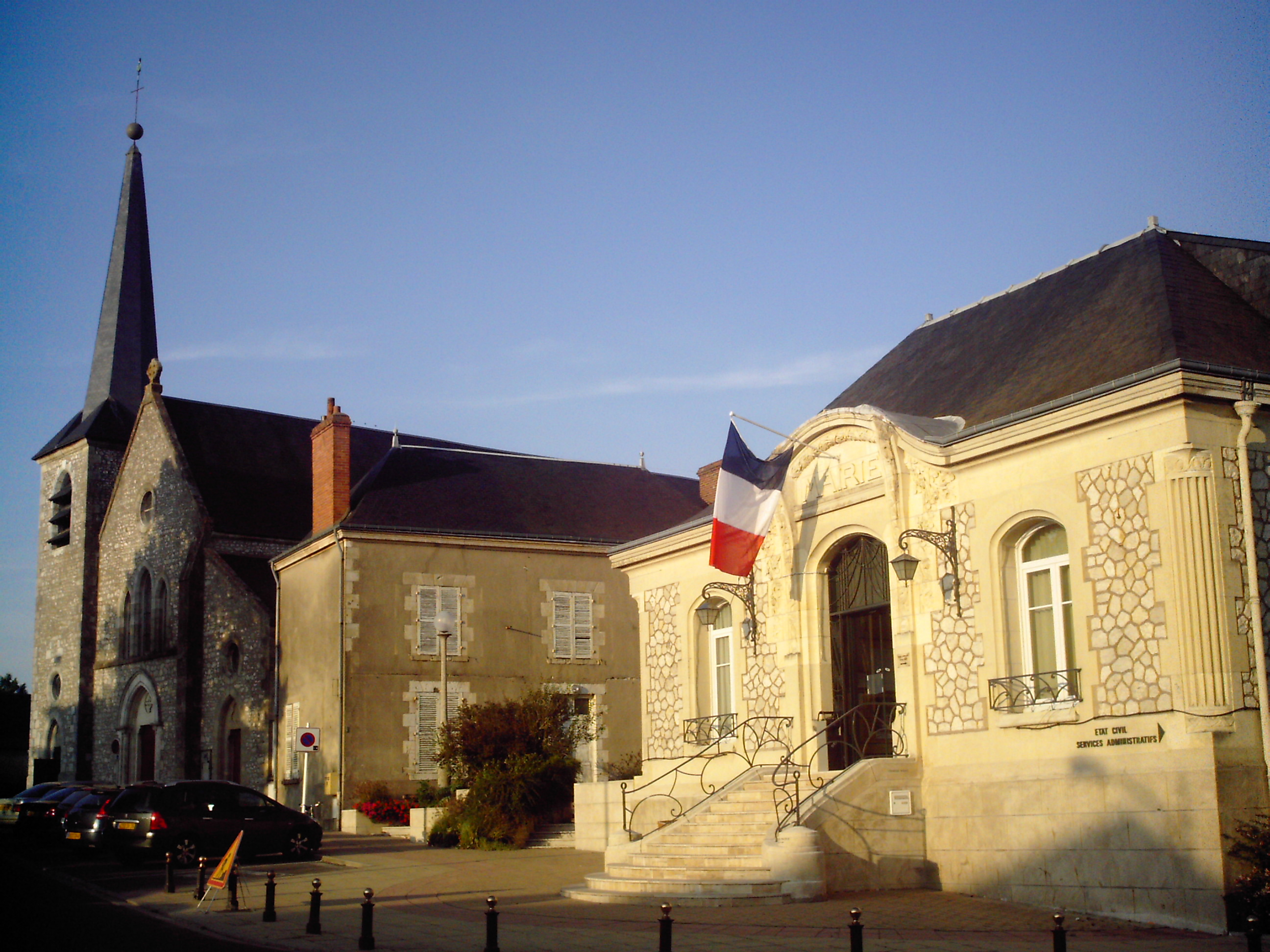 Mairie et église de Fleury-les-Aubrais (Loiret), France